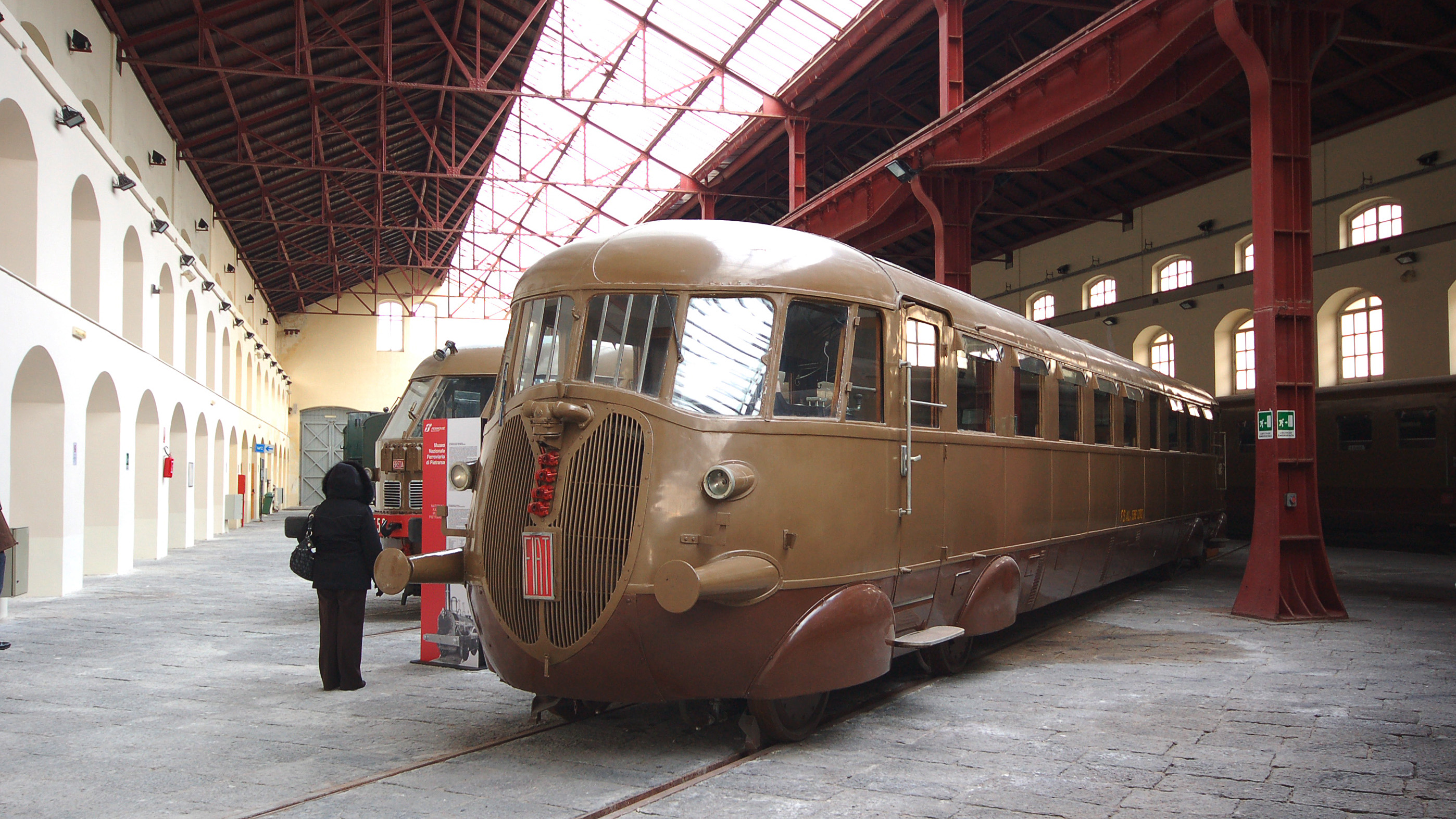 Automotrice FS ALn 556 1202 al Museo Nazionale Ferroviario di Pietrarsa il 3/1/2008